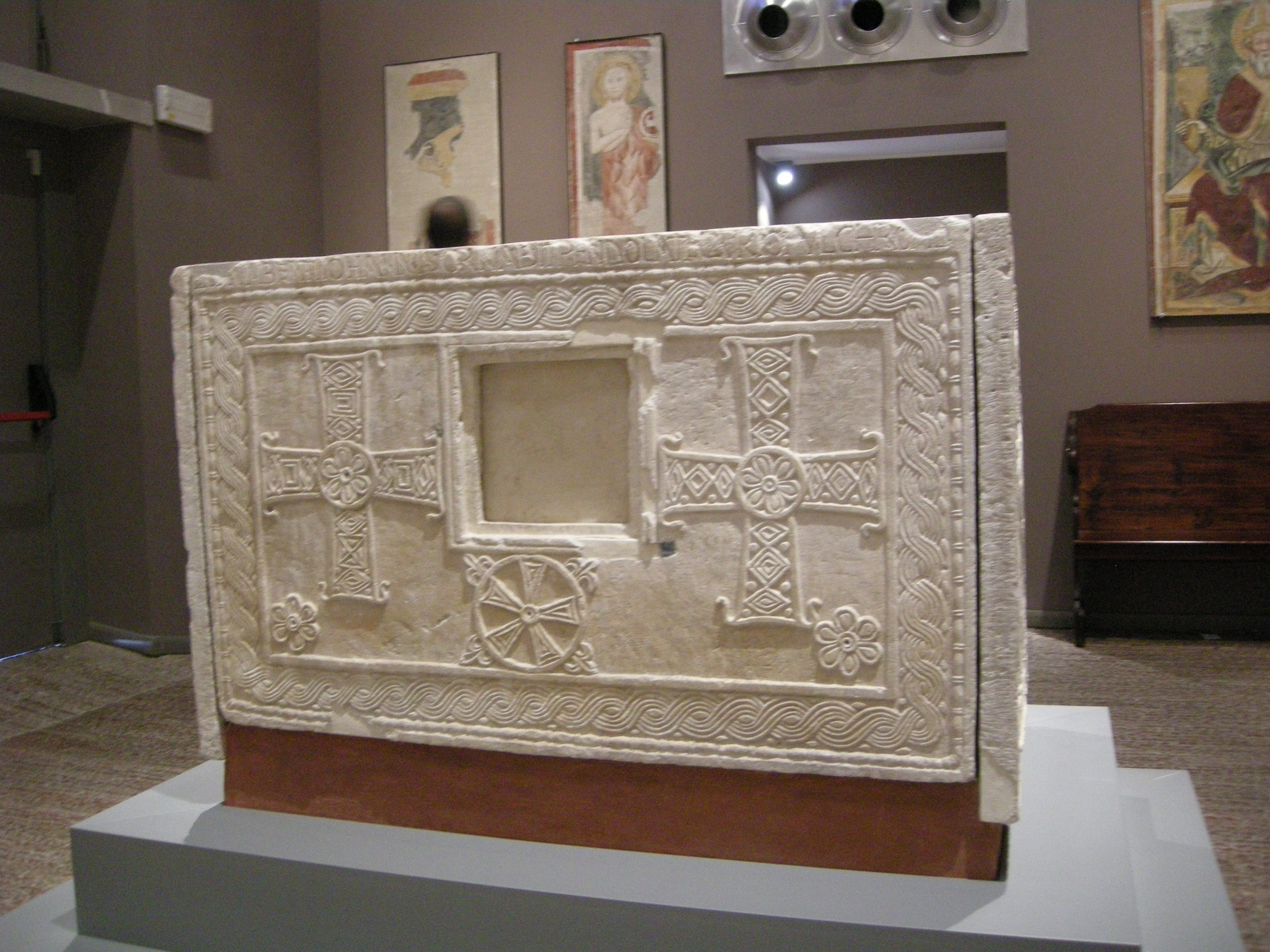 Cividale, museo cristiano, altare del duca rachis